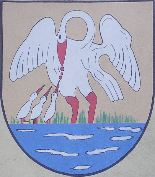 Wappen der Gemeinde Wünschendorf/Elster